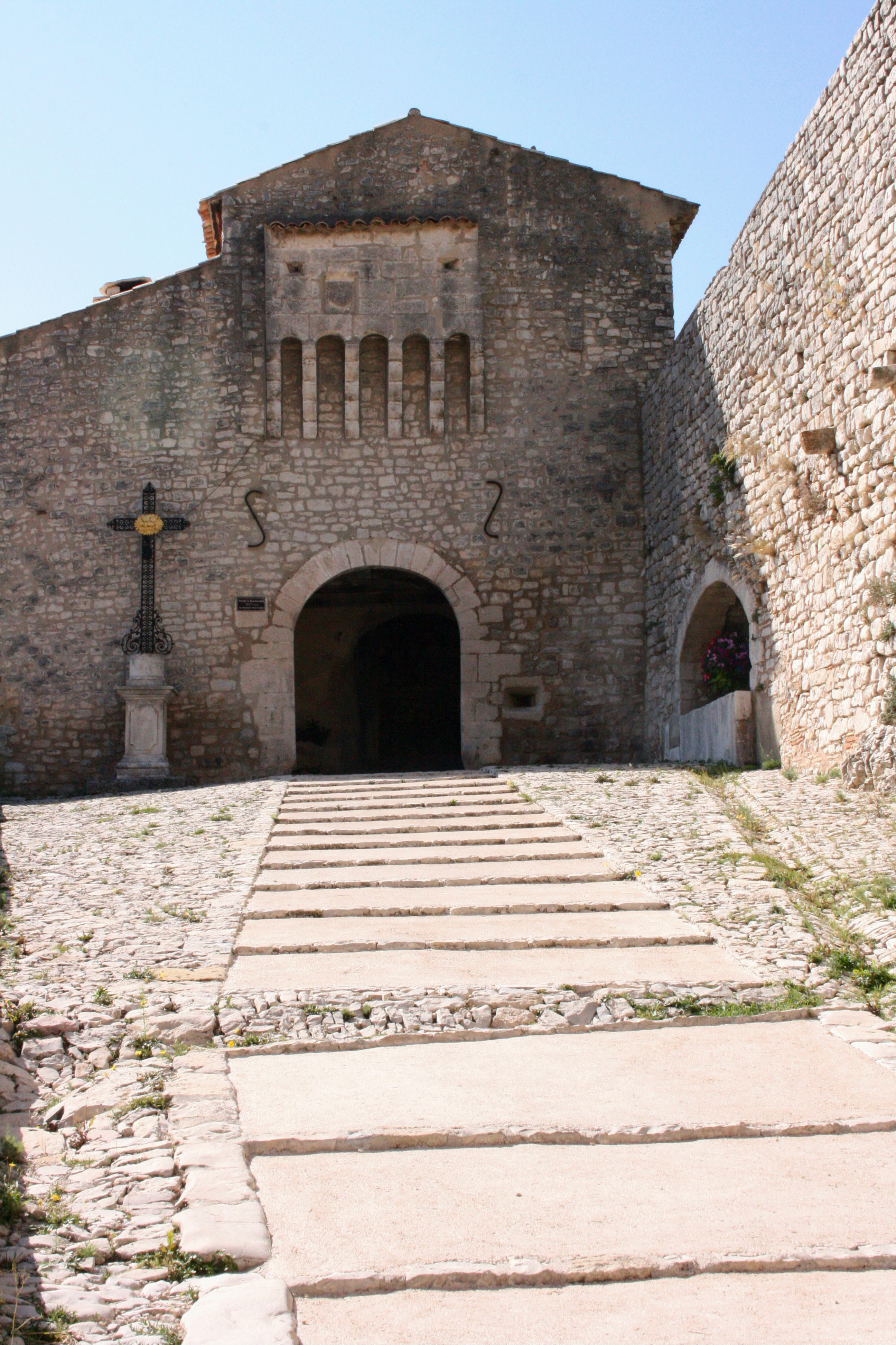 Banon, département des Alpes-de-Haute-Provence (France). Porte en plein cintre à bretèche par laquelle on accède au vieux village